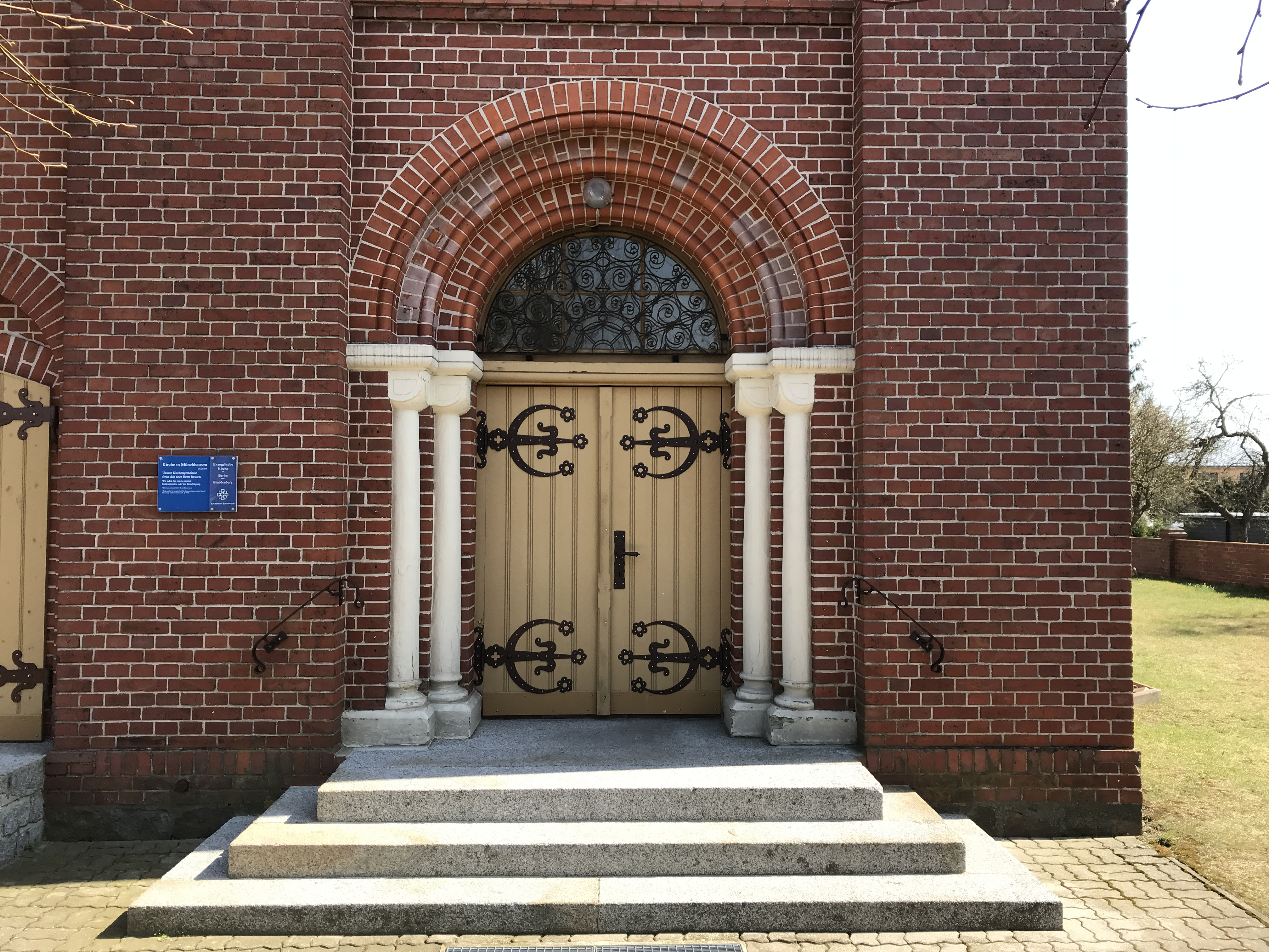 Die Dorfkirche in Münchhausen der Gemeinde Sonnewalde wurde im Jahr 1895 erbaut. Im Innern befindet sich eine bauzeitliche Kirchenausstattung.